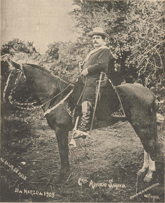 Fotografía del militar y caudillo de Uruguay, Aparicio Saravia, en el marco del levantamiento de 1903.